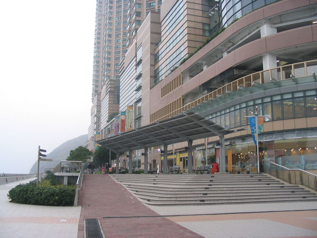 小西灣海濱花園 Siu Sai Wan Promenade